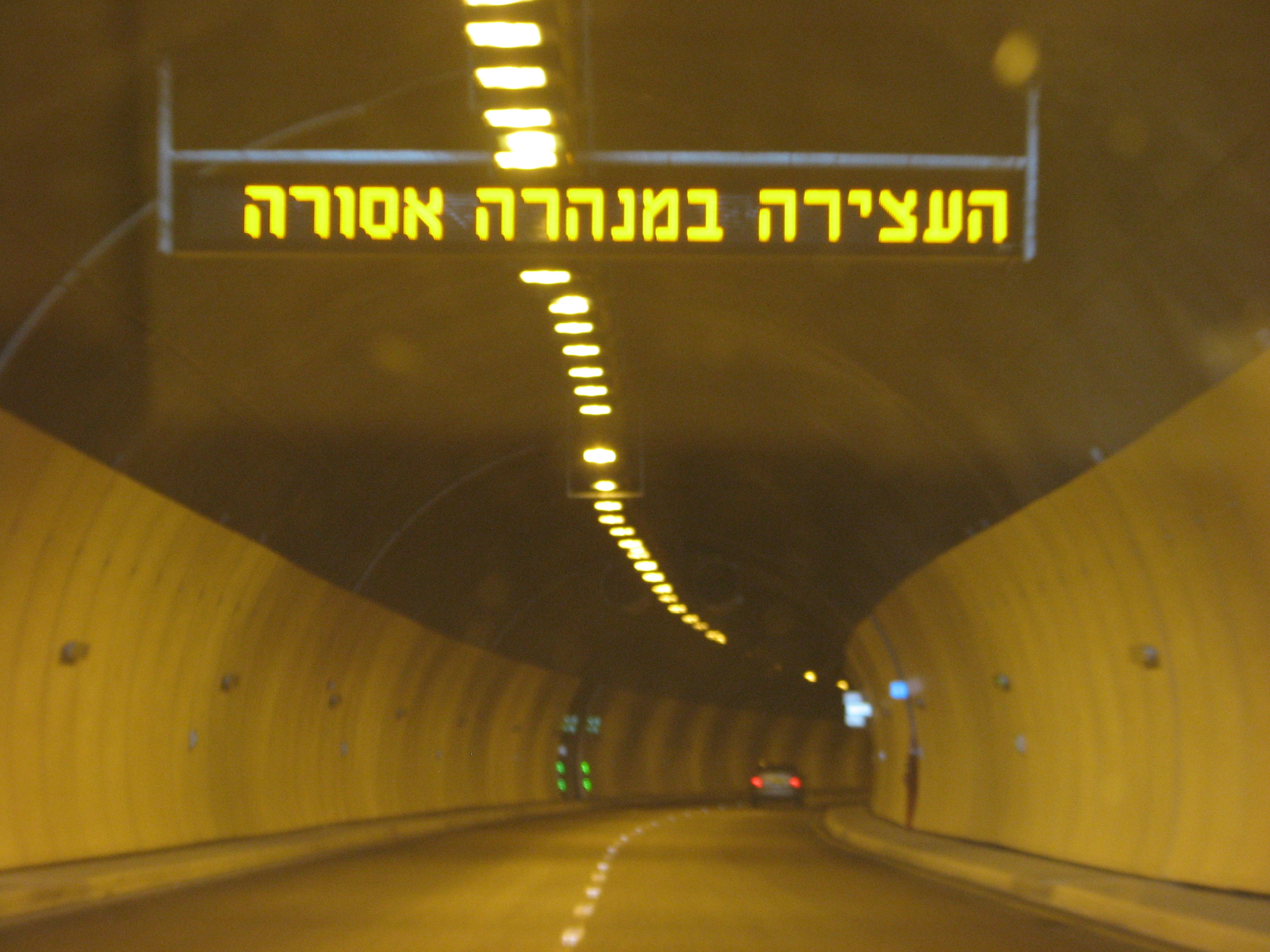 Carmel Tunnels in Haifa, Israel מנהרות הכרמל בחיפה, ישראל נסיעה במנהרה כניסה הדרומית של חיפה לכוון נווה שאנן